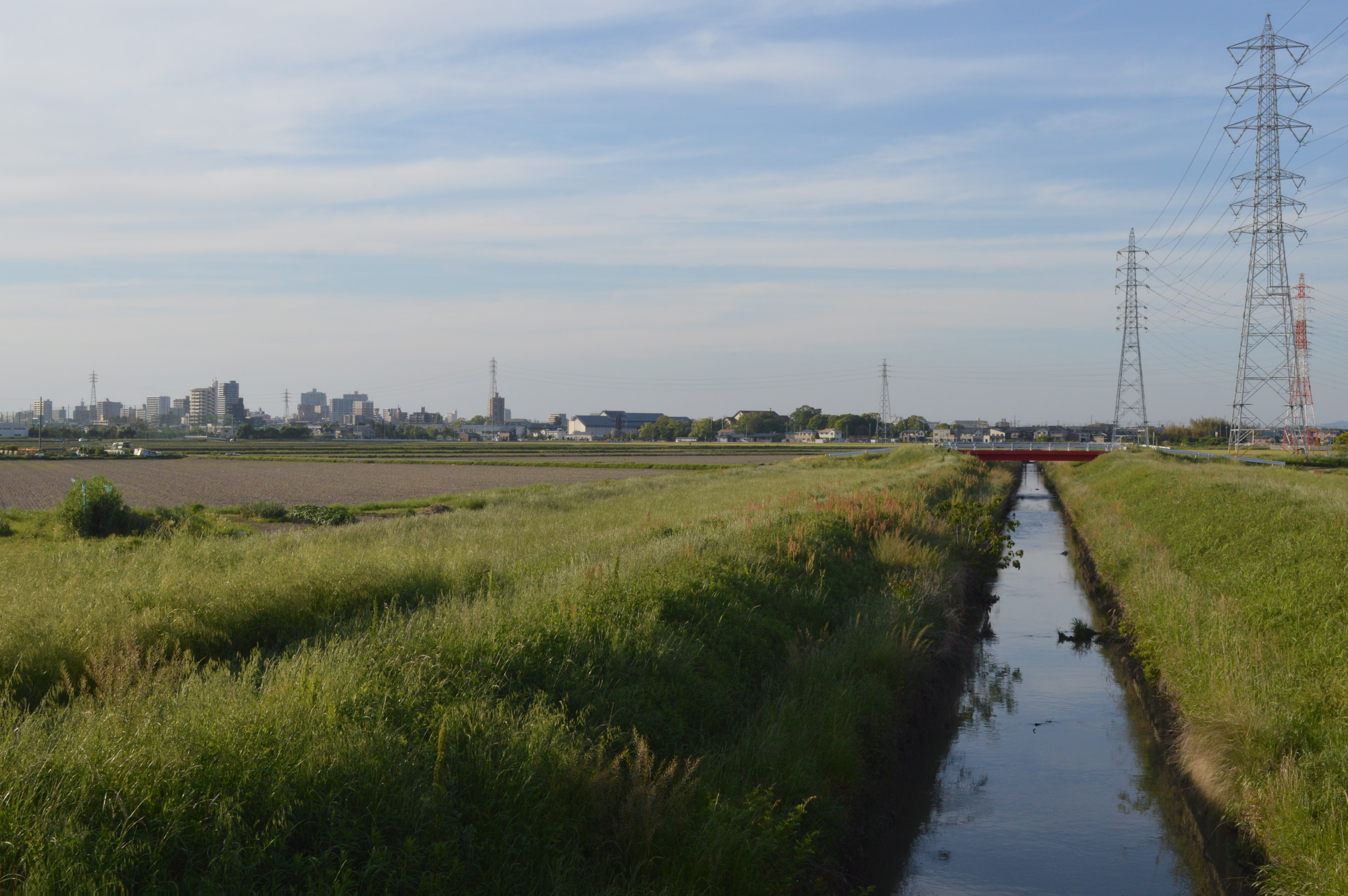 愛知県安城市を流れる鹿乗川（西鹿乗川）。